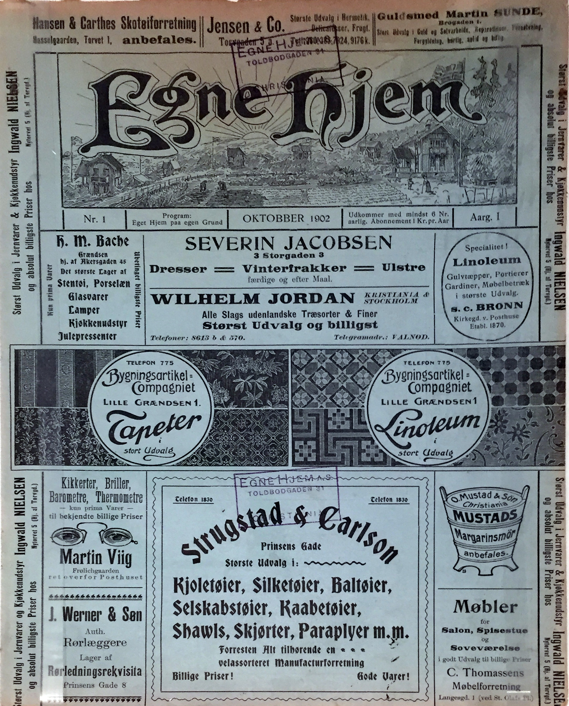 Bladet Egne hjem, nr 1, årgang 1. Oktober 1902.